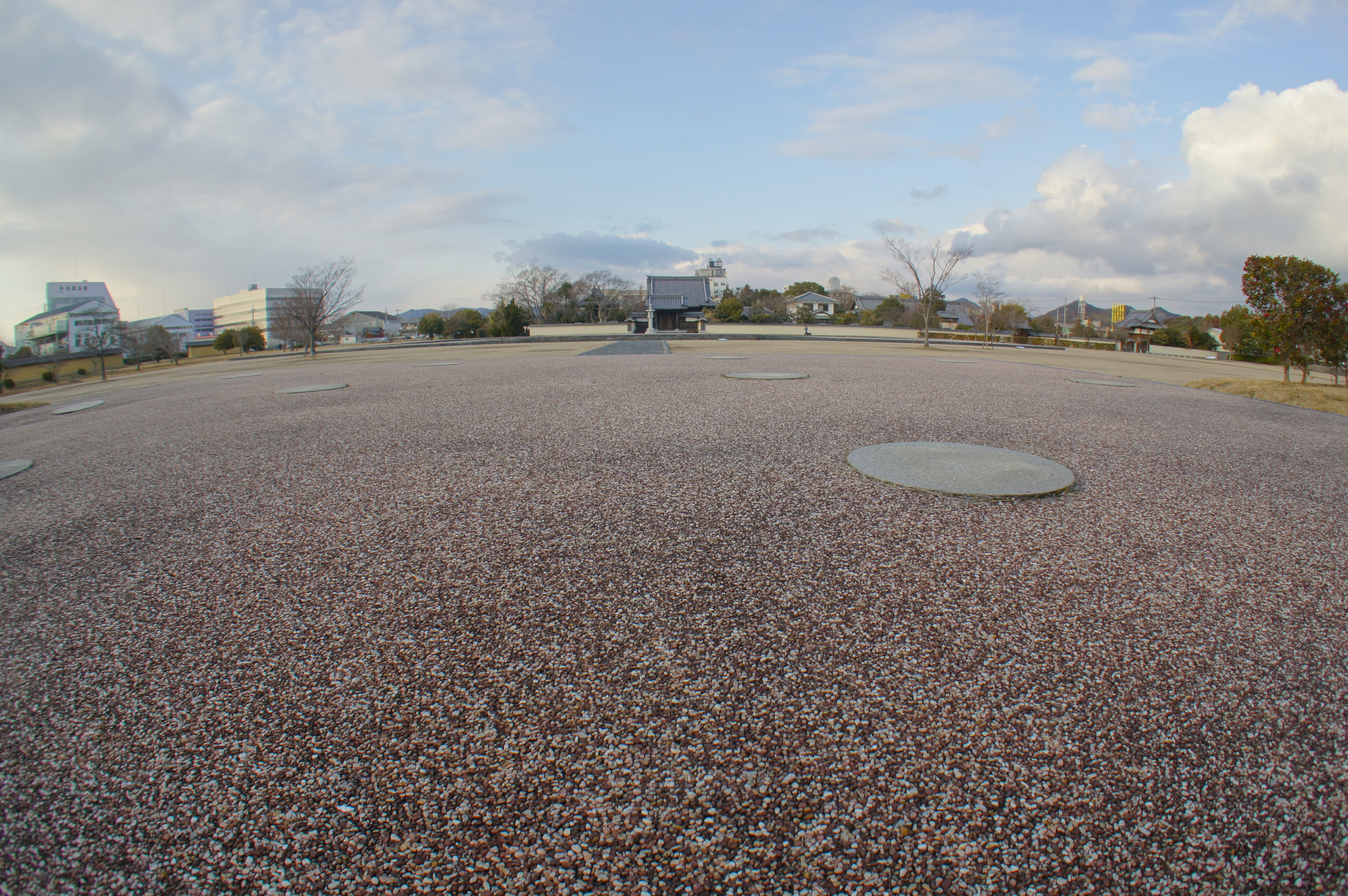 播磨国分寺跡 中央奥は現 国分寺